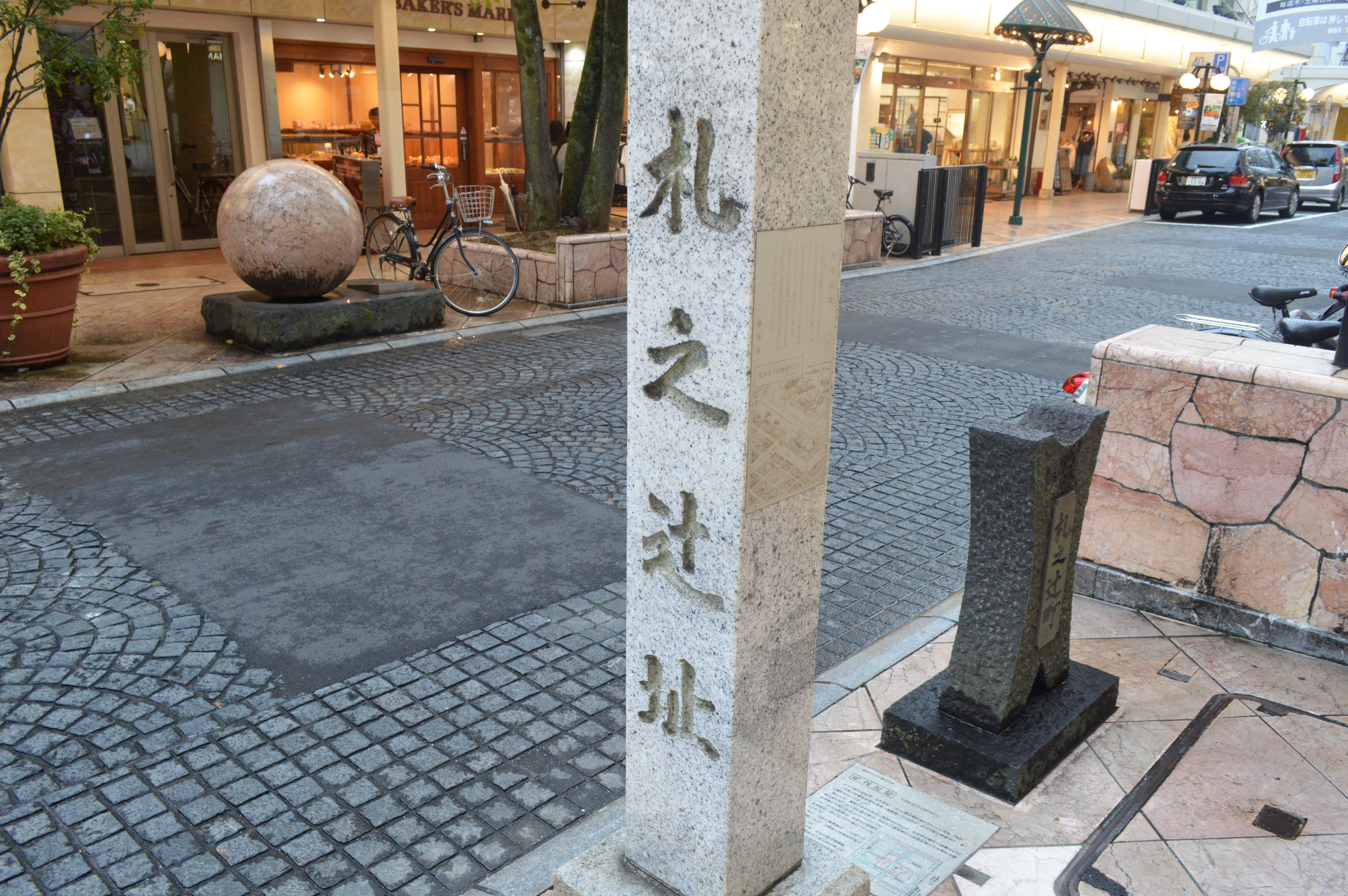 静岡市葵区。七間町通りと呉服町通りの交差点にある「札之辻址」。